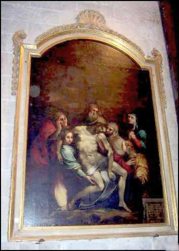 Descendimiento de Cristo pintura al óleo de Blas de Prado expuesta en la Catedral de Valencia (España)